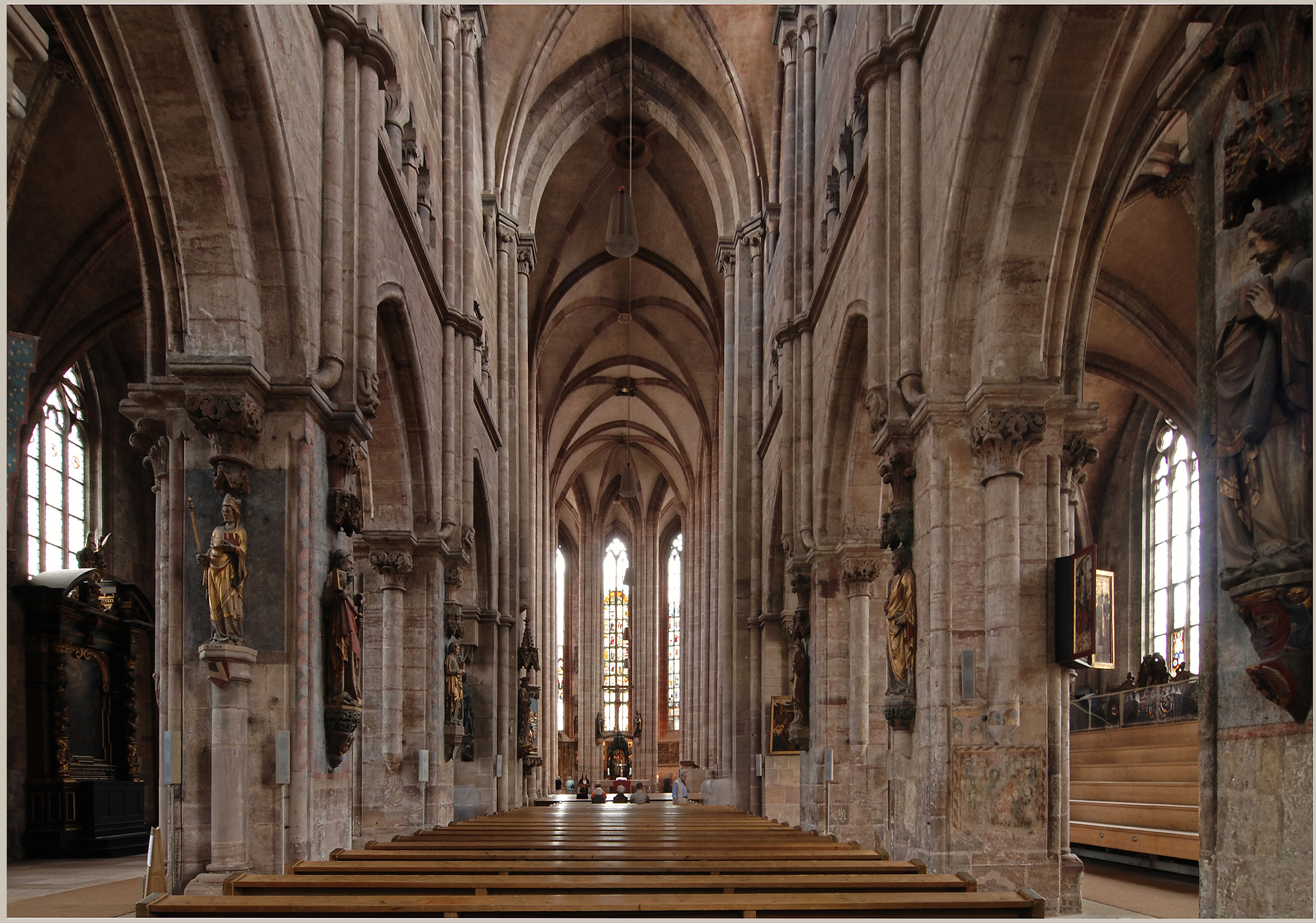 Die mittelalterliche Kirche St. Sebald in Nürnberg, auch Sebalduskirche genannt, ist neben der Frauenkirche und der Lorenzkirche einer der herausragenden Kirchenbauten der Stadt. Sie ist eine doppelchörige Basilika und wurde in der Zeit von 1225-1273 errichtet.